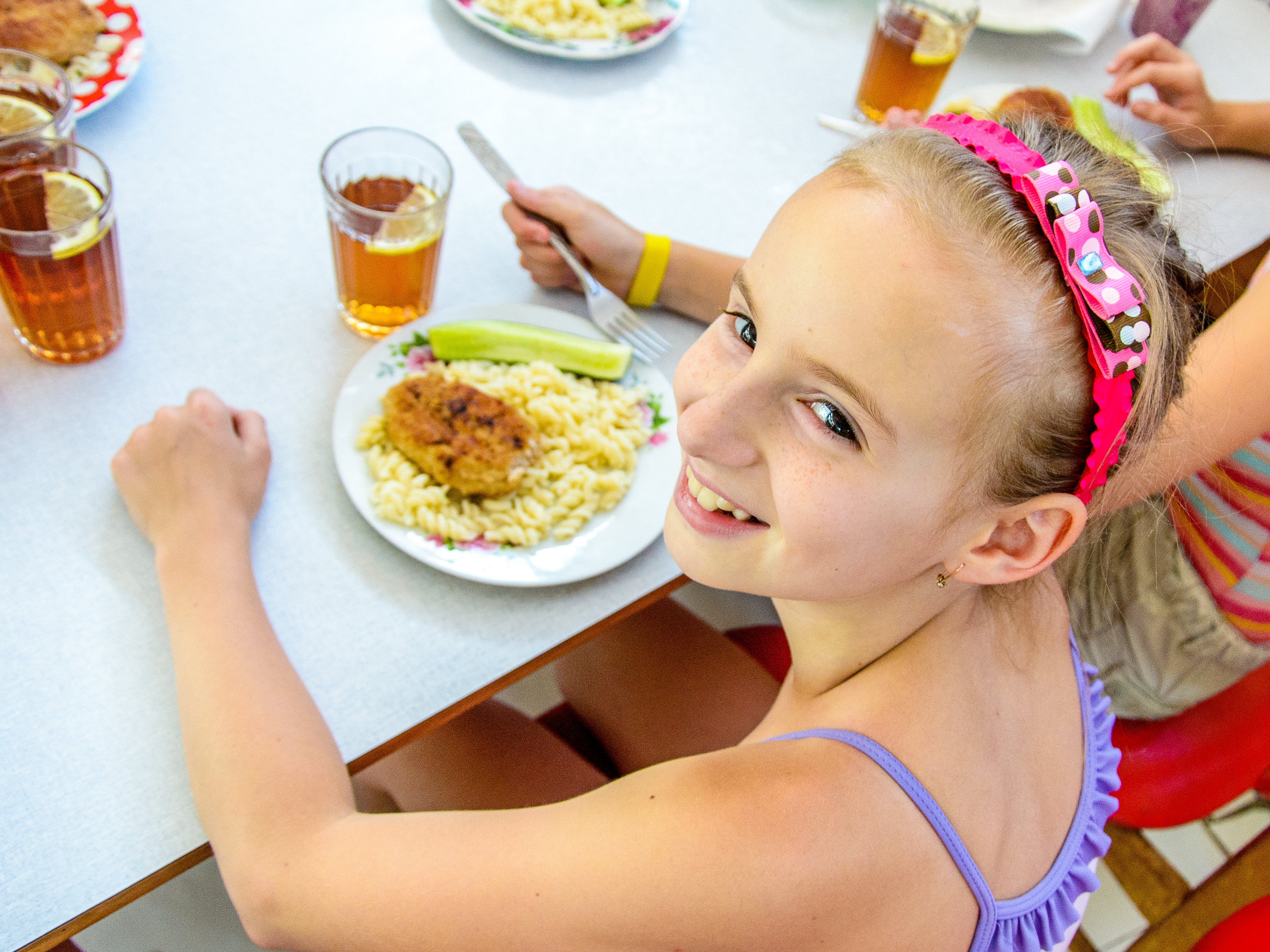 Харчування